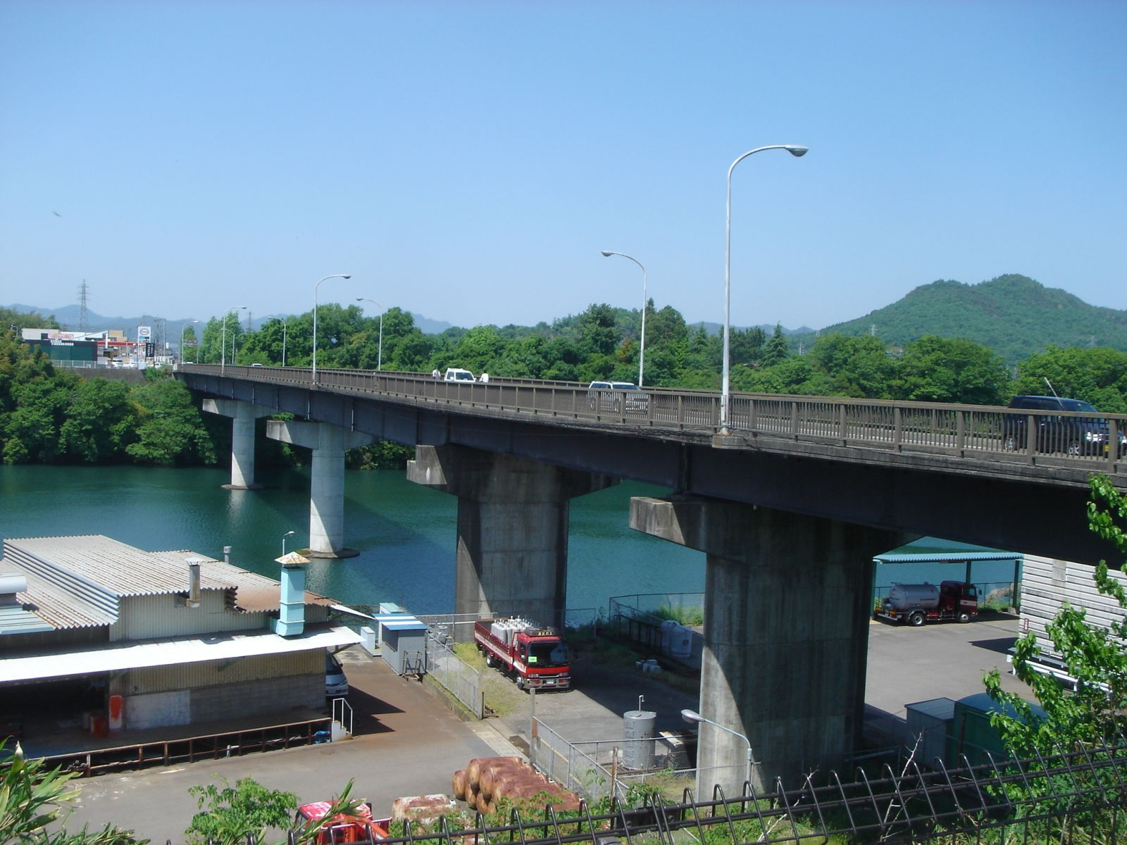 Kawai Ohashi Bridge over Kiso River(川合大橋),Kani,Gifu,Japan(岐阜県可児市)で下流側より撮影